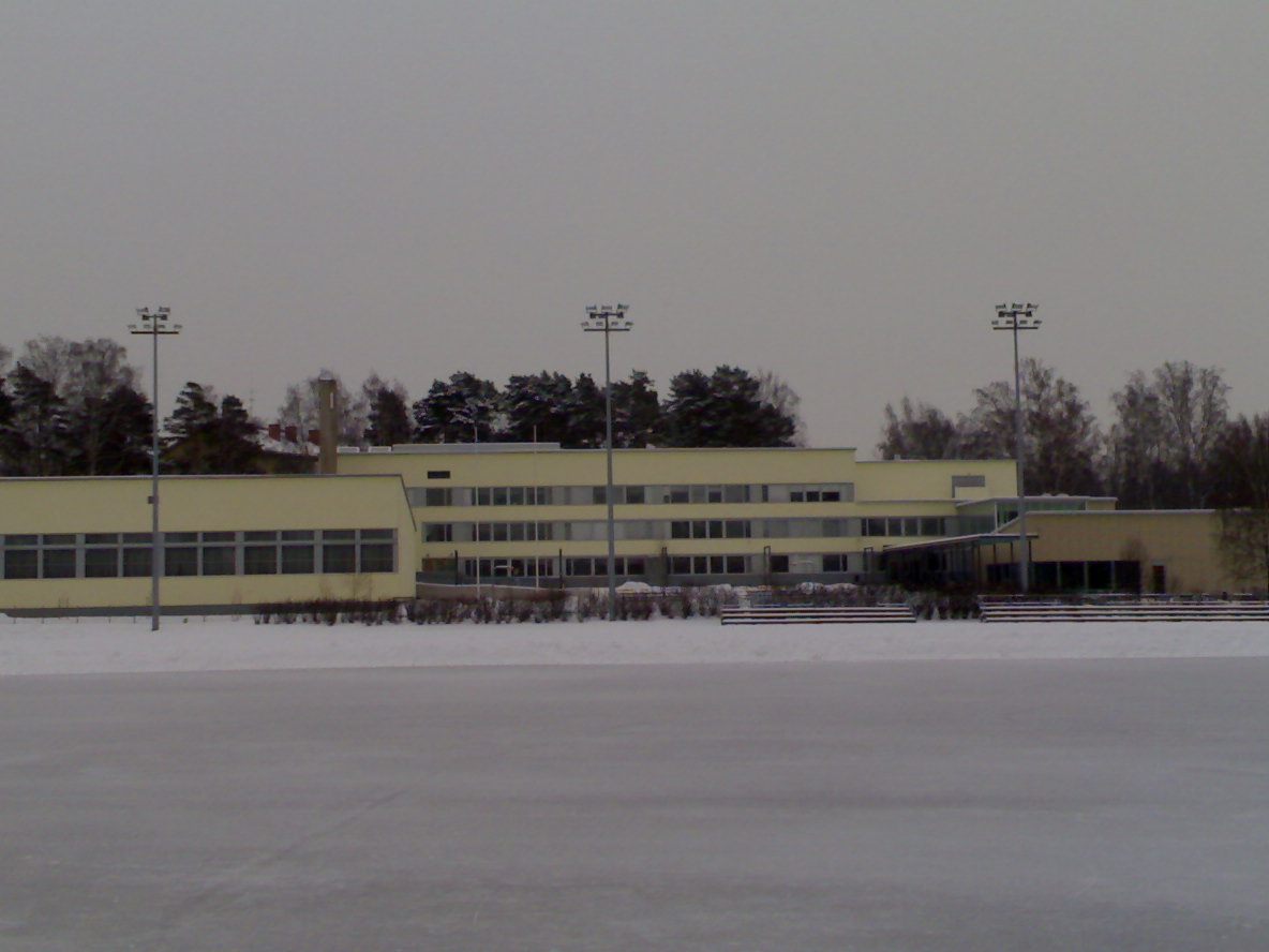 Porolahden peruskoulu